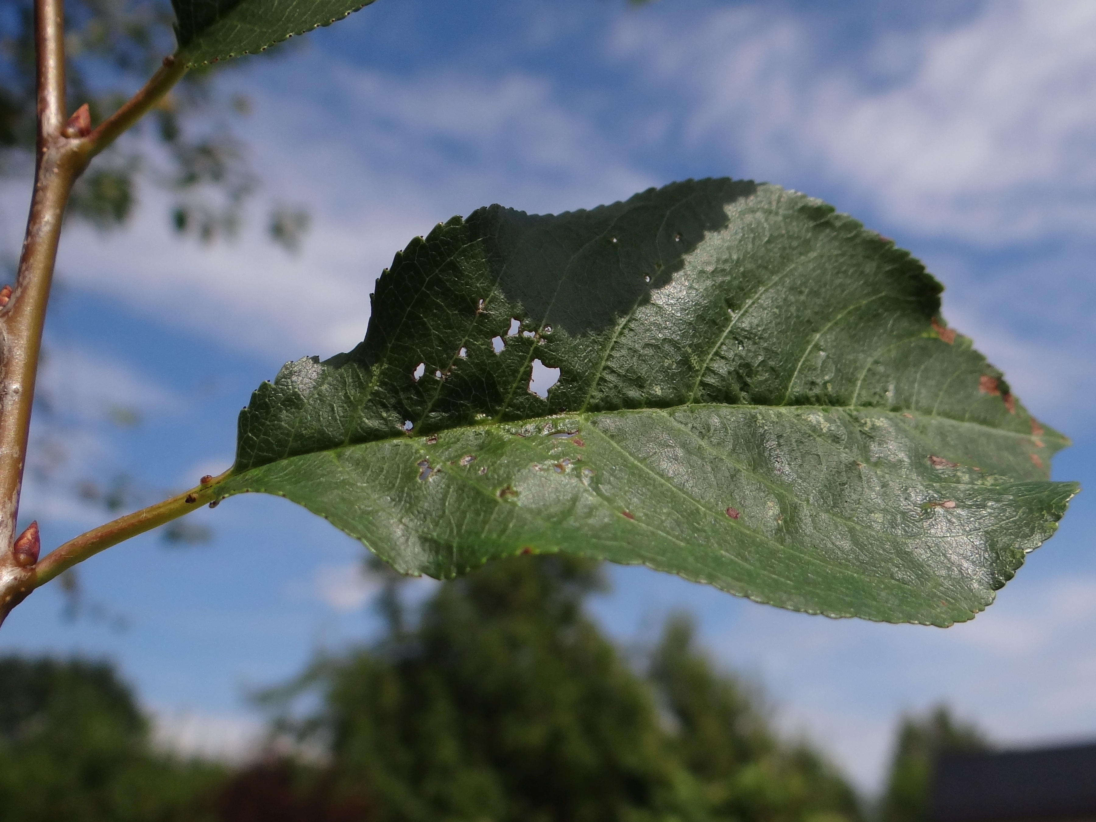 Stigmina carpophila on Cerasus vulgaris